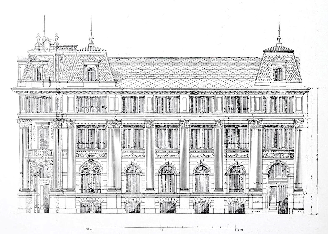 Palazzo della Banca Commerciale Italiana di Torino, prospetto sulla via Santa Teresa di Pietro Vassallo (1908) da L'Architettura Italiana (ottobre 1908)